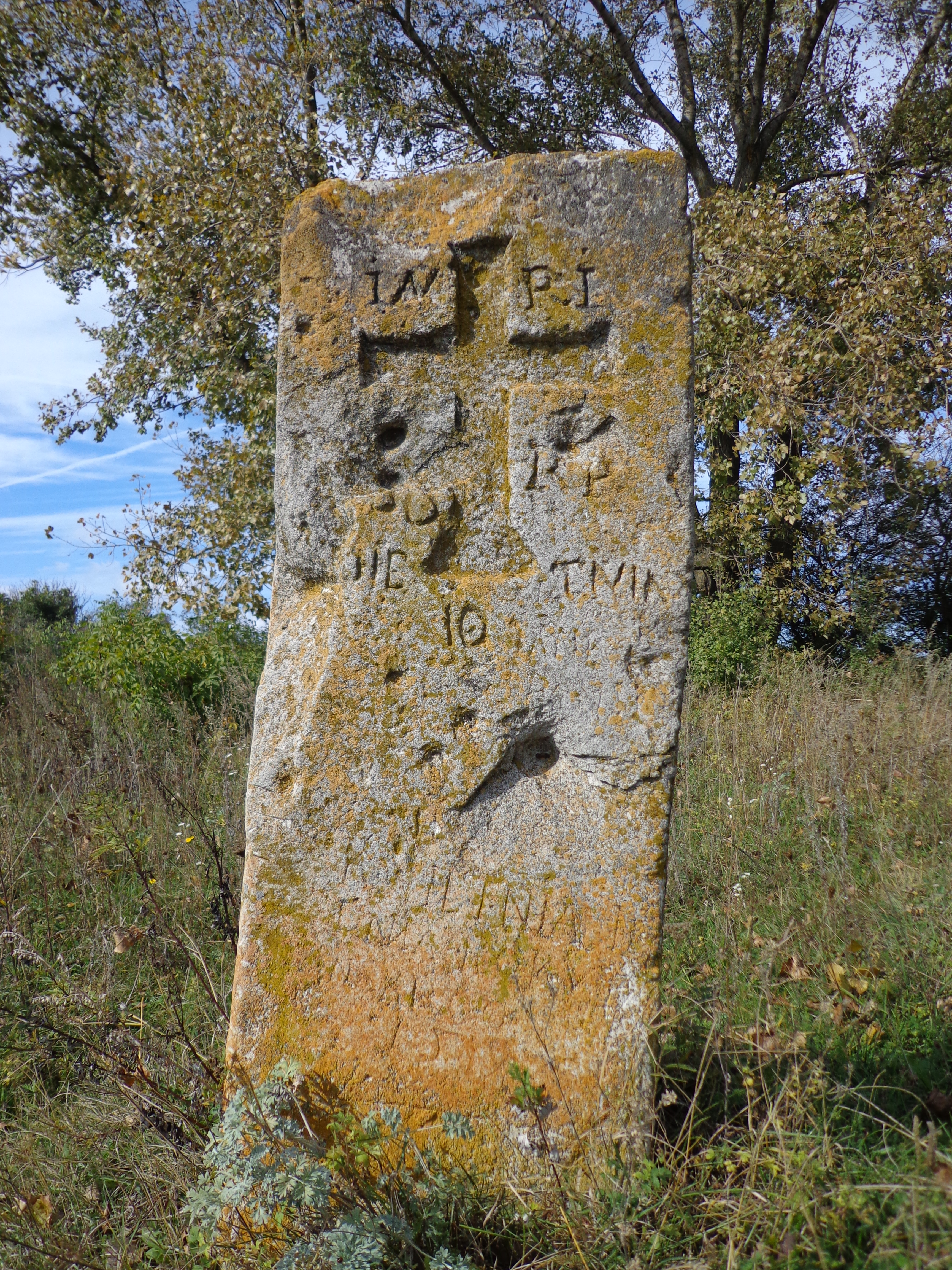 Пам'ятний знак (надгробна плита (стела) з написом латинською мовою) «Чолганський камінь», біля господарського двору в селі Чернелів-Руський Тернопільського району Тернопільської області.